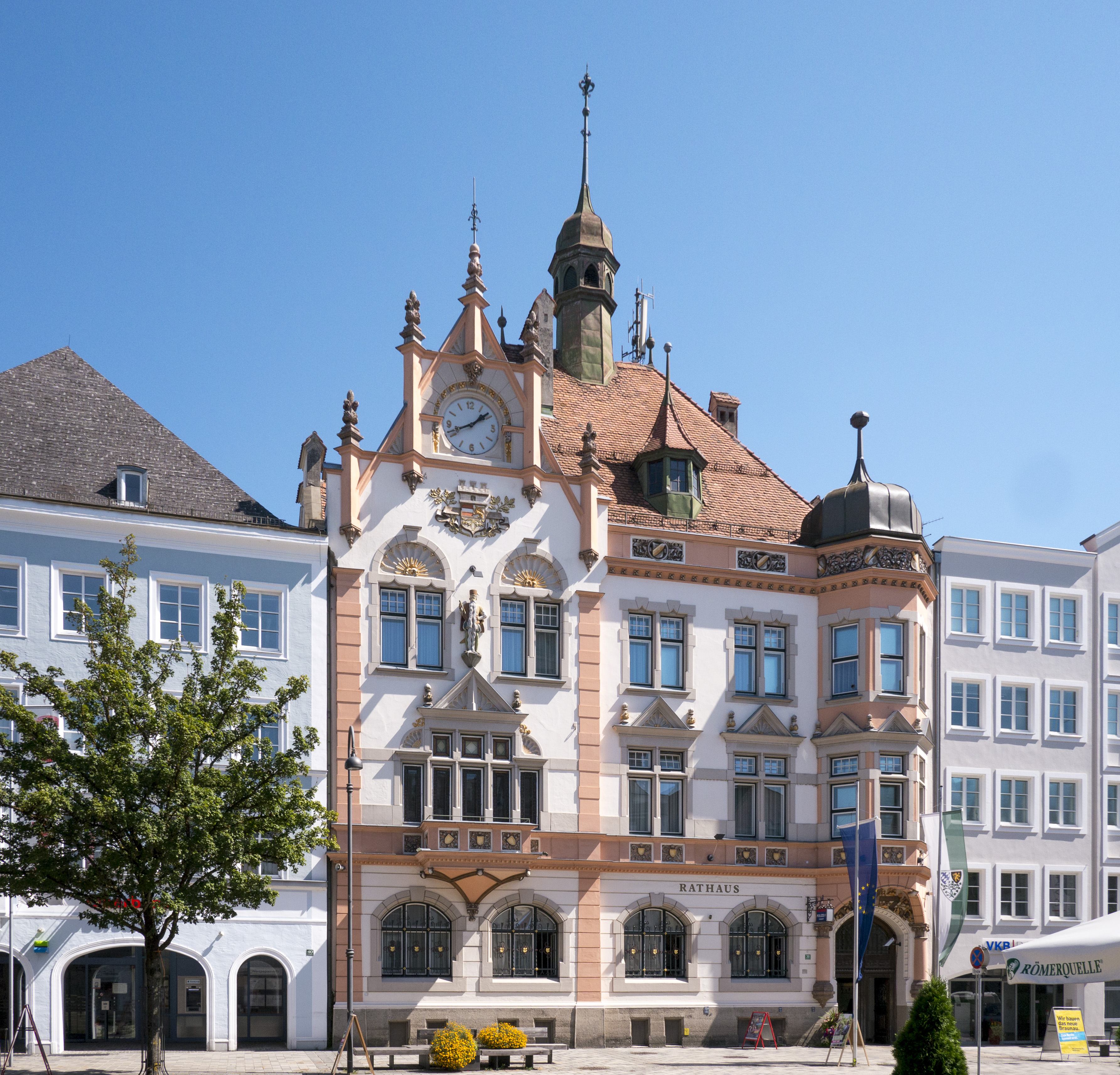 Rathaus